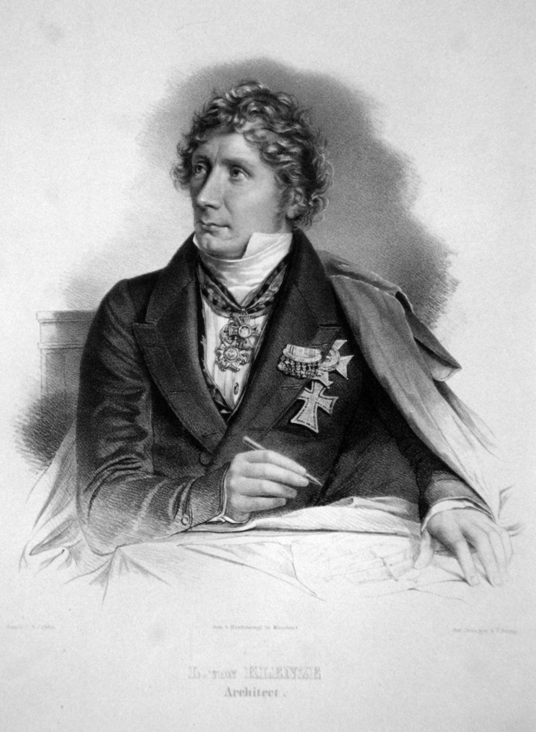 Leo Klenze, Lithographie von Ignaz Fertig nach A. Condex